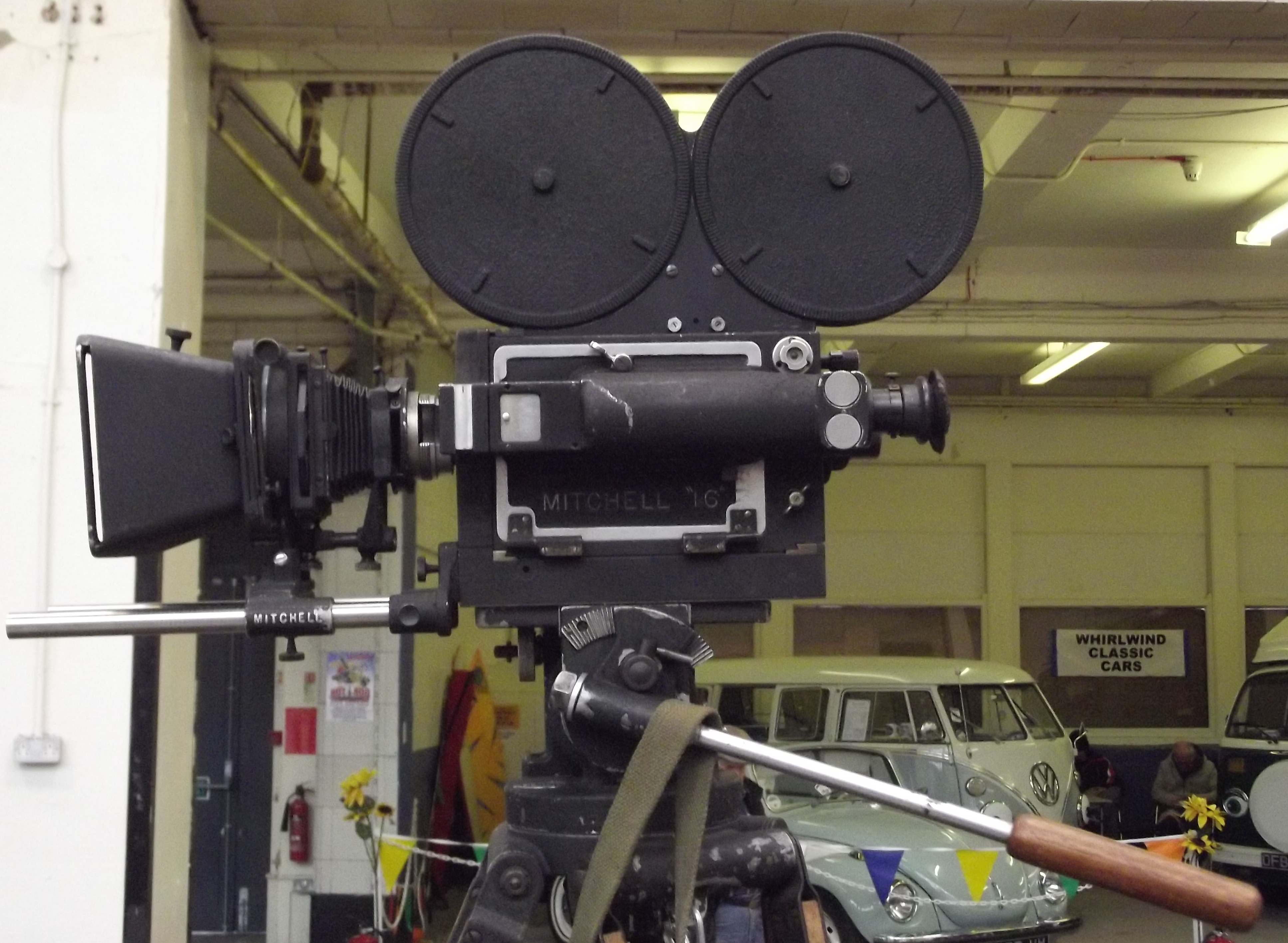 Mitchell NC movie camera